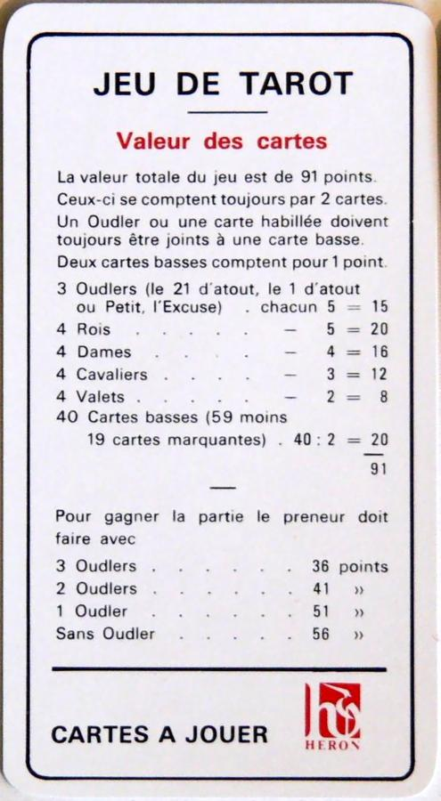 Jeu de Tarot - Valeur des cartes